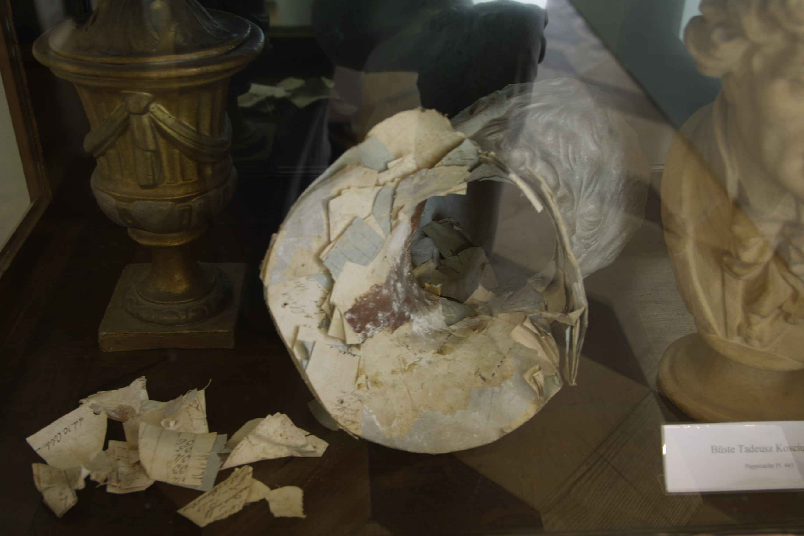 In dern Ludwigsluster Schlossanlage wurde durchgehend Pappmaché als Werkstoff zur Imitation hochwertigerer Materialien verwendet.